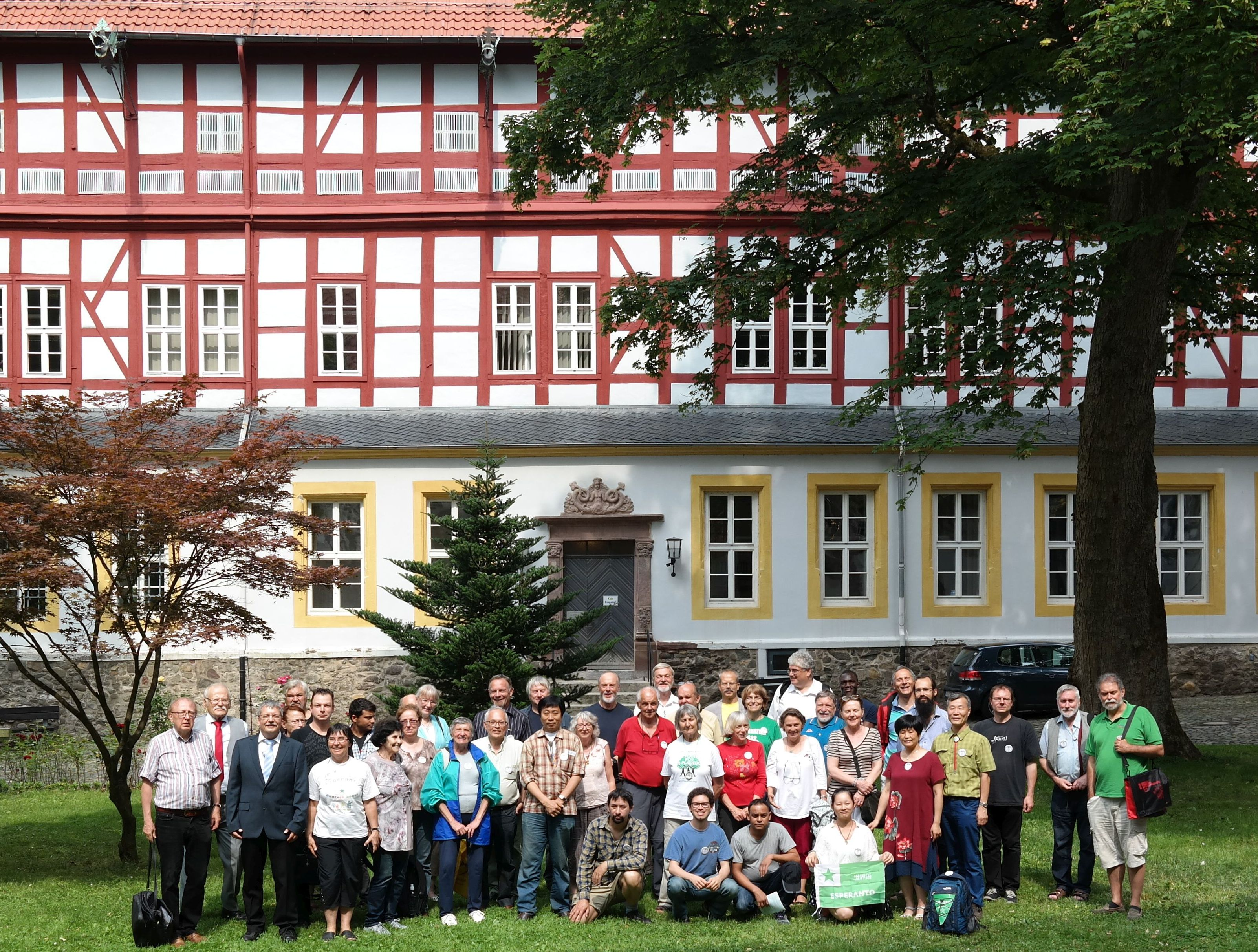 Esperantistoj dum SAT kongreso en Kastelo de Hercbergo